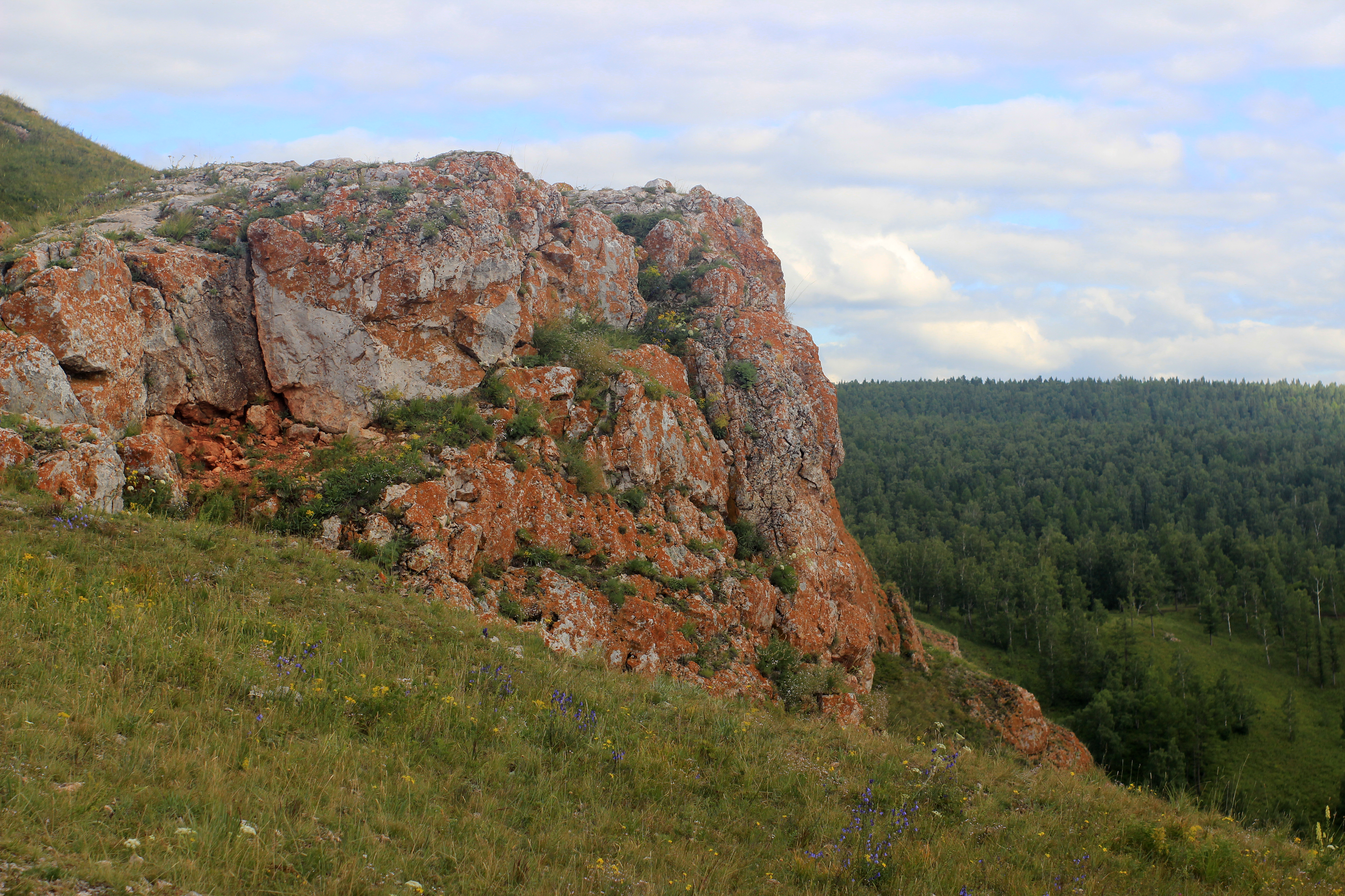 Базаихский разрез: Березовский район, Красноярский край Светло-серые известняковые скалы Торгашинского хребта издалека выглядят рыжими. Причина того — эпилитные лишайники, густо обрастающие поверхность скал, преимущественно это ярко-оранжевая Ксантория элегантная (Xanthoria elegans). This image is related to the protected area of Russia number 2410028